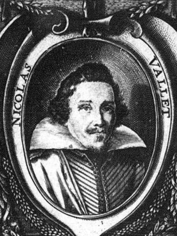 Nicolas Vallet